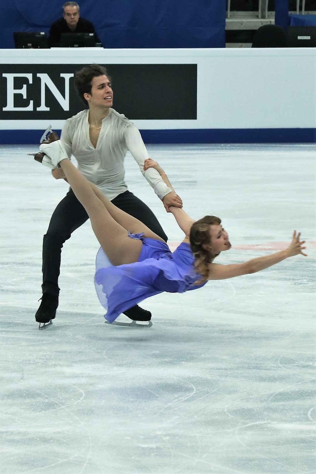 Анжелика Абашкина / Луис Таурон (Франция) на Чемпионате Европы по фигурному катанию 2018.